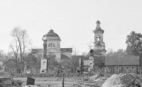 Беларуская (тарашкевіца): Прапойск (Prapojsk). Царква Раства Багародзіцы